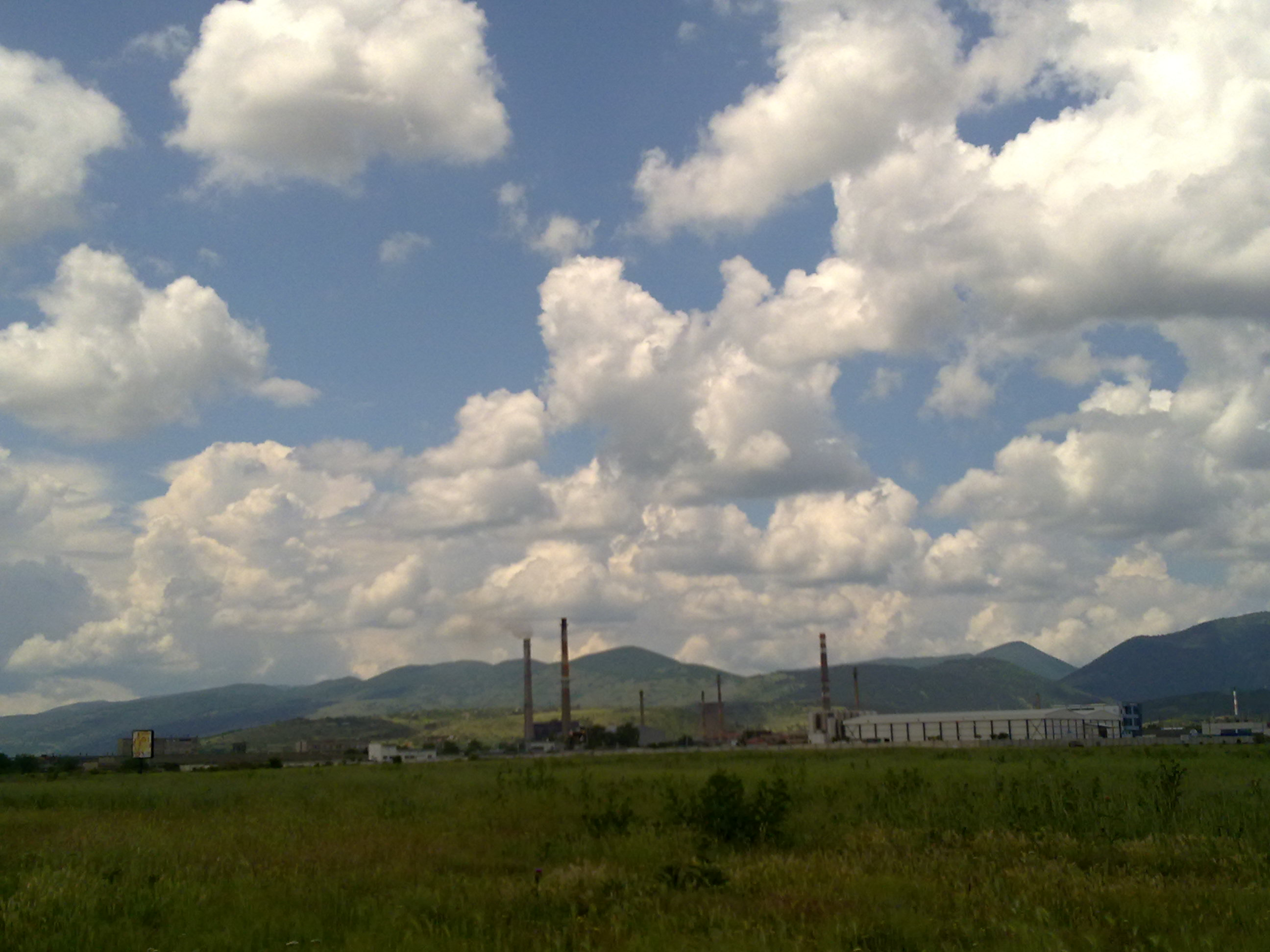 Част от индустриалната зона на Сливен. На преден план е Сливенското поле, а най-отзад се вижда Старопланинската верига и часто от Сините камъни.